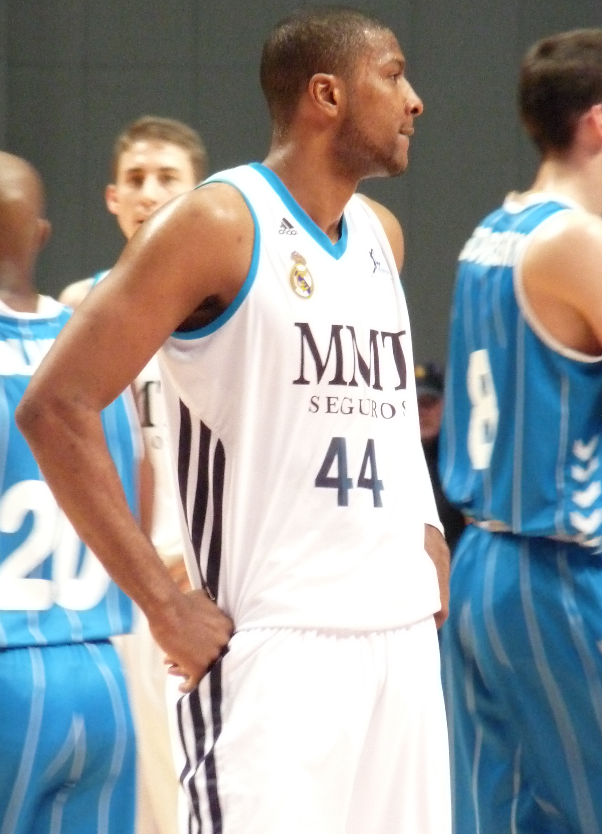 Marcus Slaughter